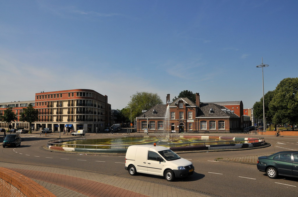 Vaillantplein Den Haag